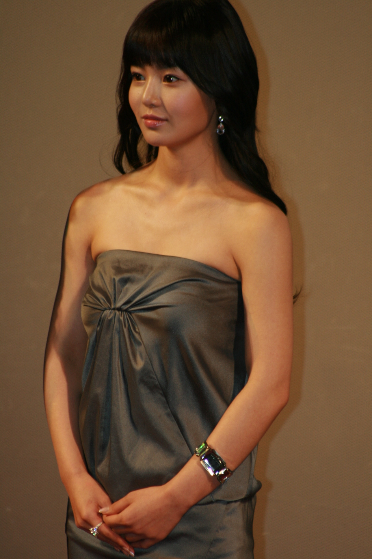 2008년 7월 29일 서울 용산 CGV에서 열린 영화 《고死: 피의 중간고사》 기자/배급 시사회에 참석한 남규리.